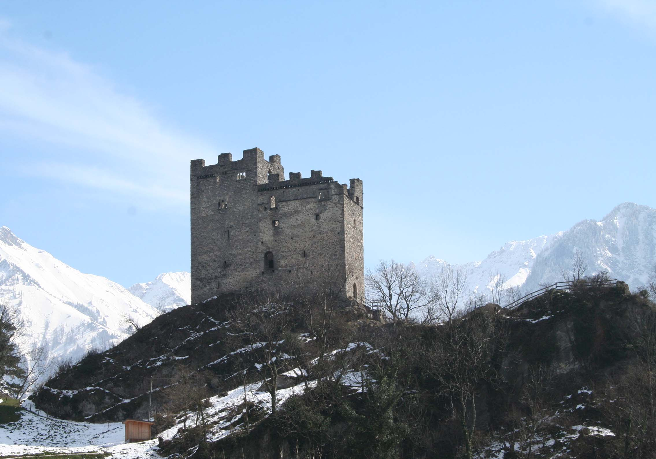 Ruine Wartau